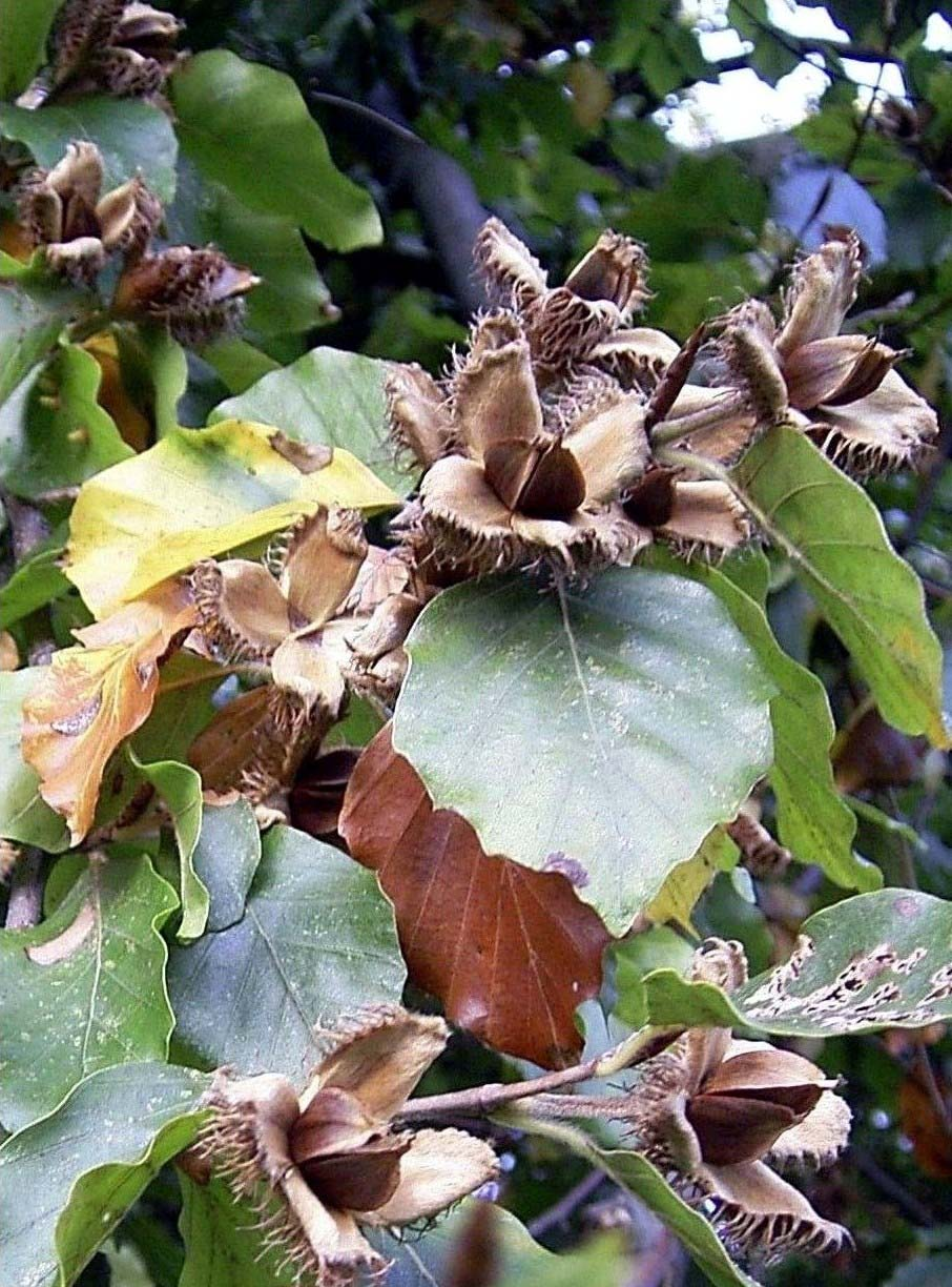 Fagus sylvatica in Bad Nenndorf, Deutschland